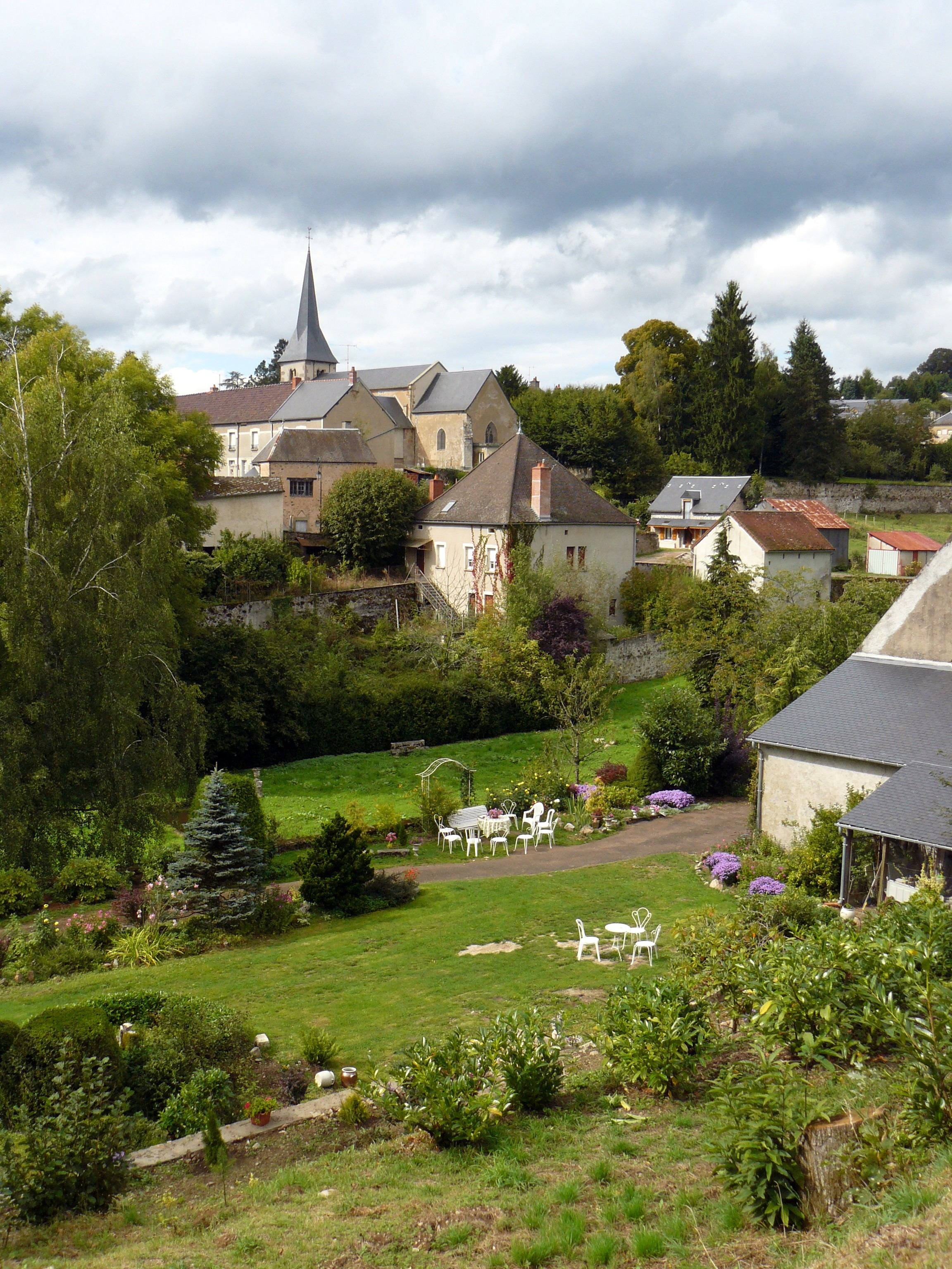 Vue de Cussy-en-Morvan (Saône-et-Loire, France)